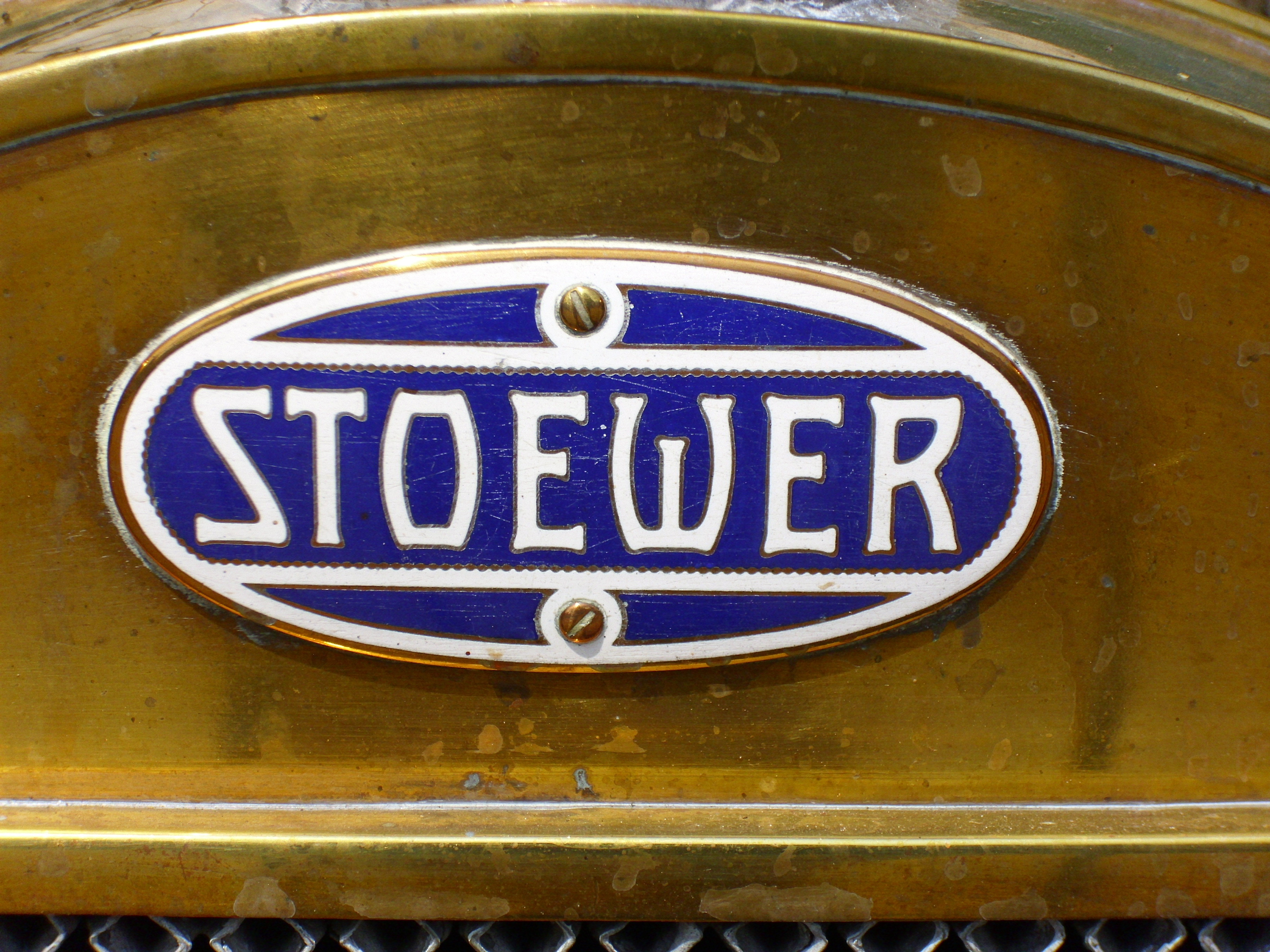 Emblem Stoewer